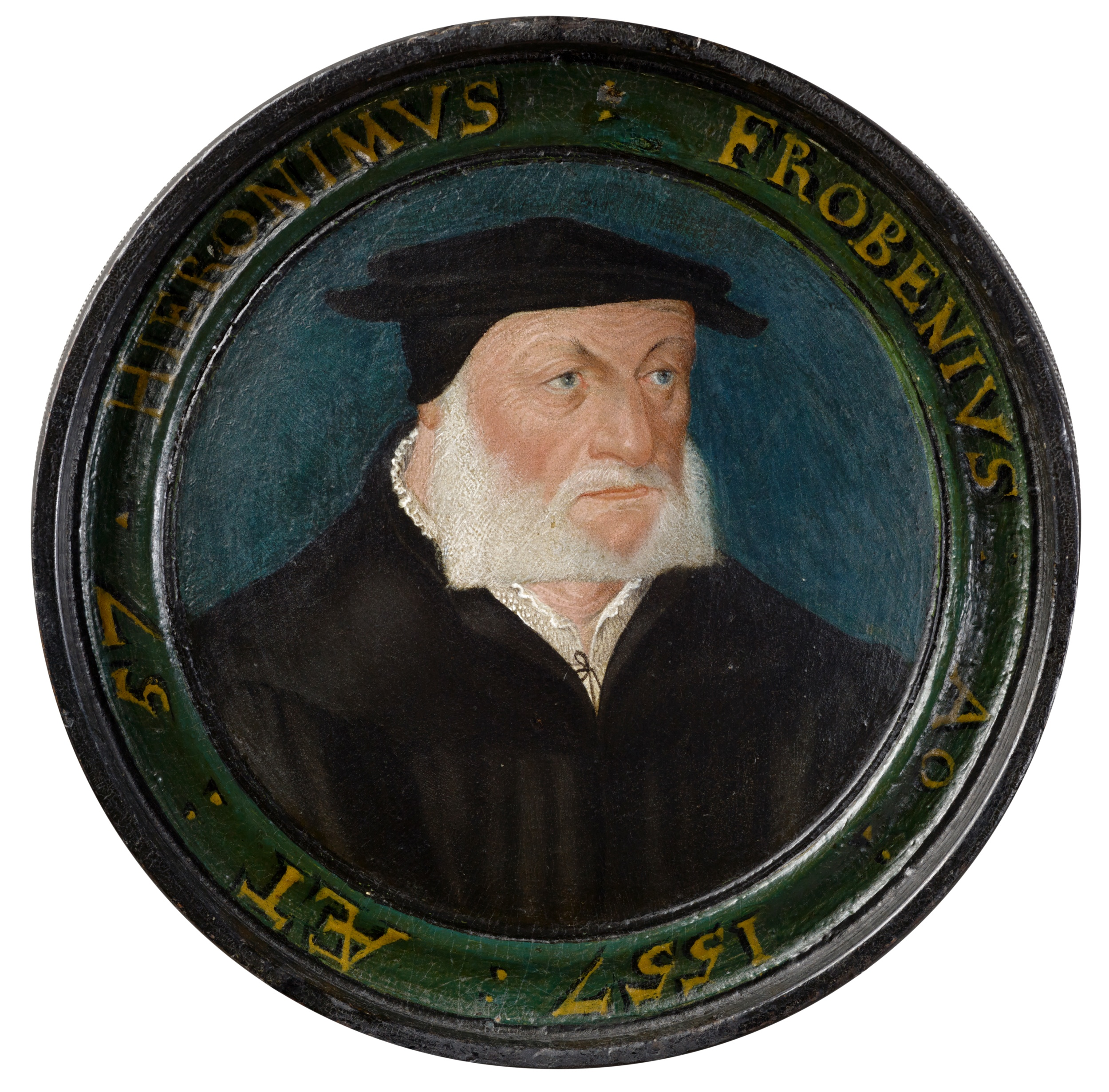 Kapselbildnis, gemalt von einem Basler Meister, 16. Jahrhundert, im Kunstmuseum Basel. Durchmesser: 10 cmDurchmesser: 13.5 cm (Bildnis, H 2.5; Inschrift Durchmesser 12.7, H 2.4); Öl auf Birnbaumholz; Inv. 41. Hieronymus Froben war ein Basler Buchdrucker.